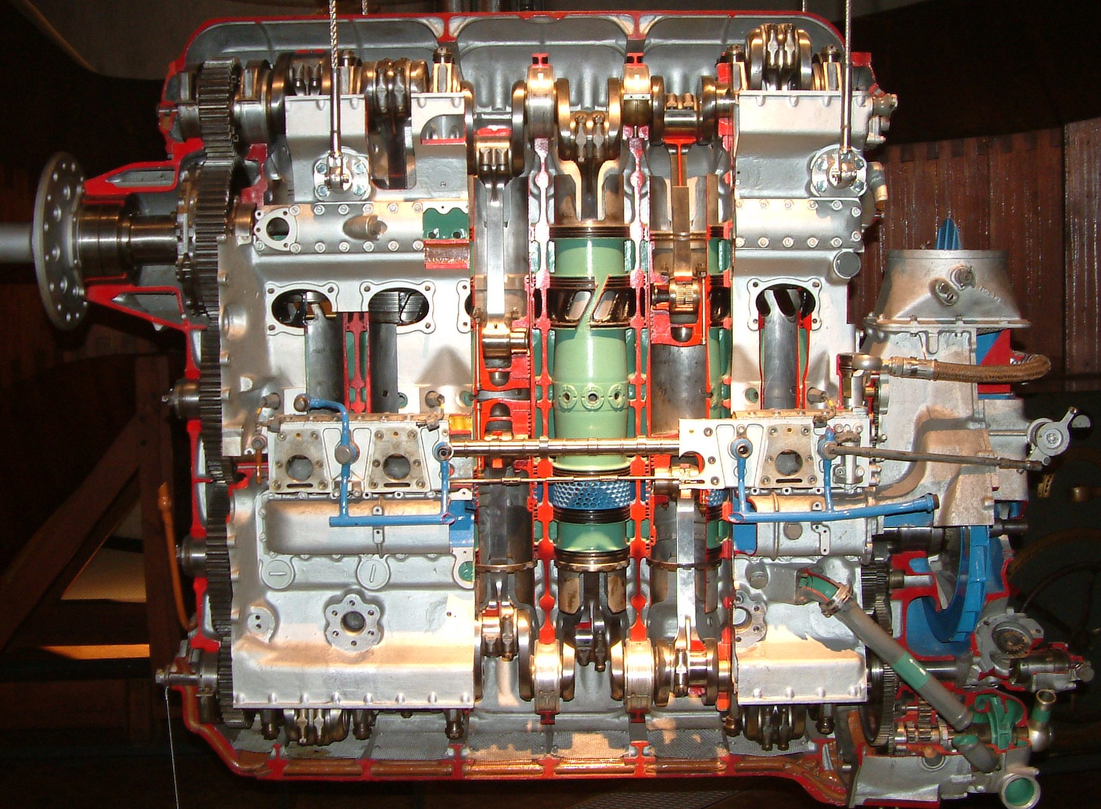 Junkers Gegenkolbenmotor